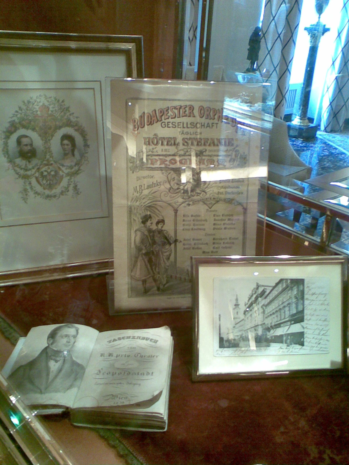 Auslage im Hotel Stephanie in Wien-Leopoldstadt mit Erinnerungsstücken der Budapester Orpheumgesellschaft